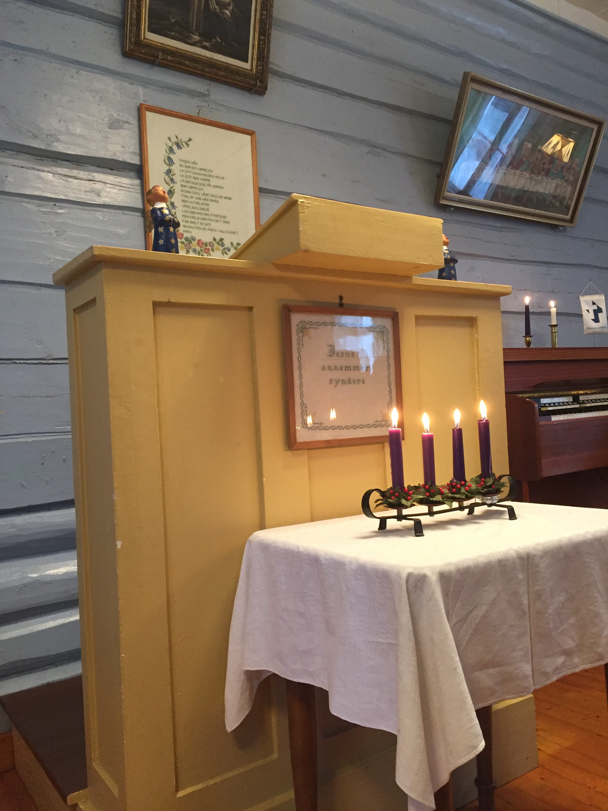 Interiør fra bedehuset i Biri Øverbygd, Betesda.